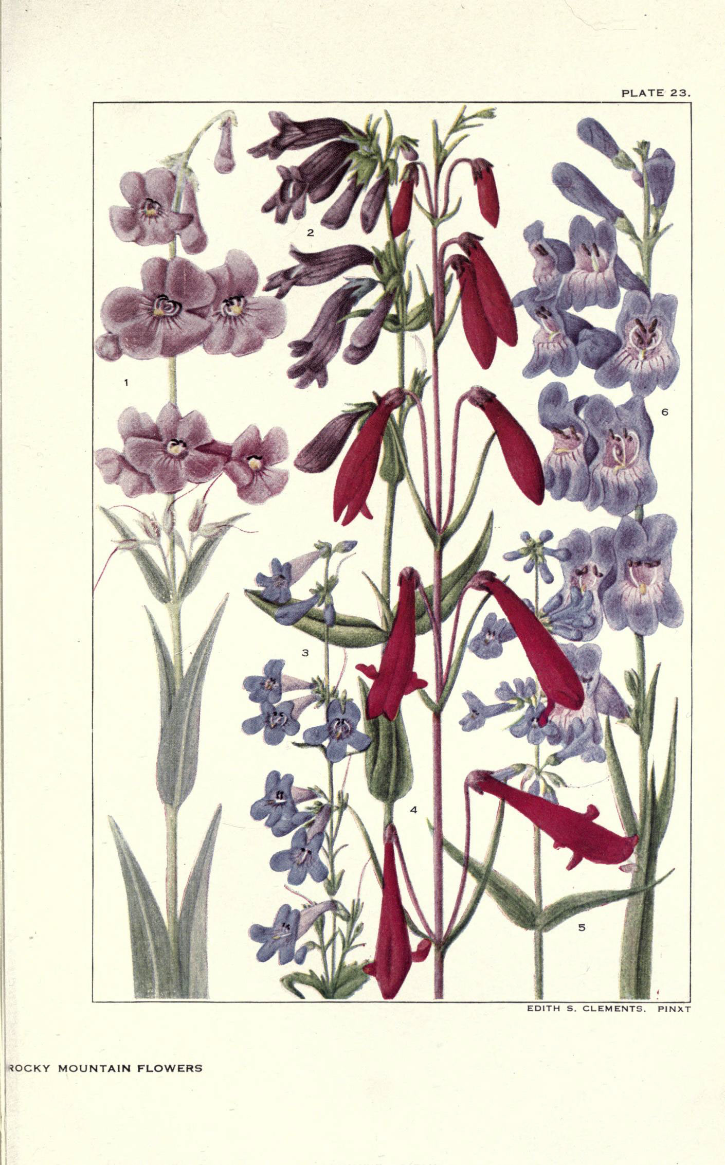 PLATE 23. Penstemon secundiflorus Penstemon glaucus = Penstemon gracilis Penstemon gracilis Penstemon barbatus Penstemon confertus Penstemon unilateralis